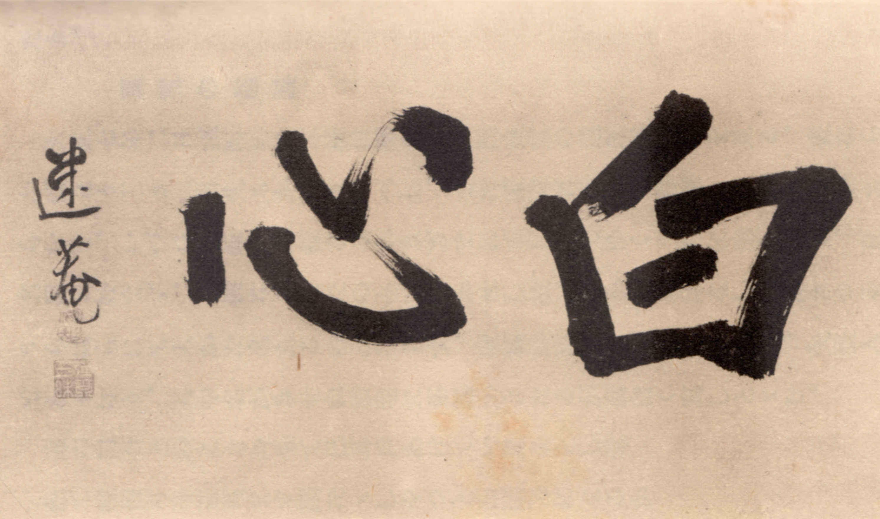 市野迷庵の書。昭和5年刊行の『本之話』（岡書院）より。